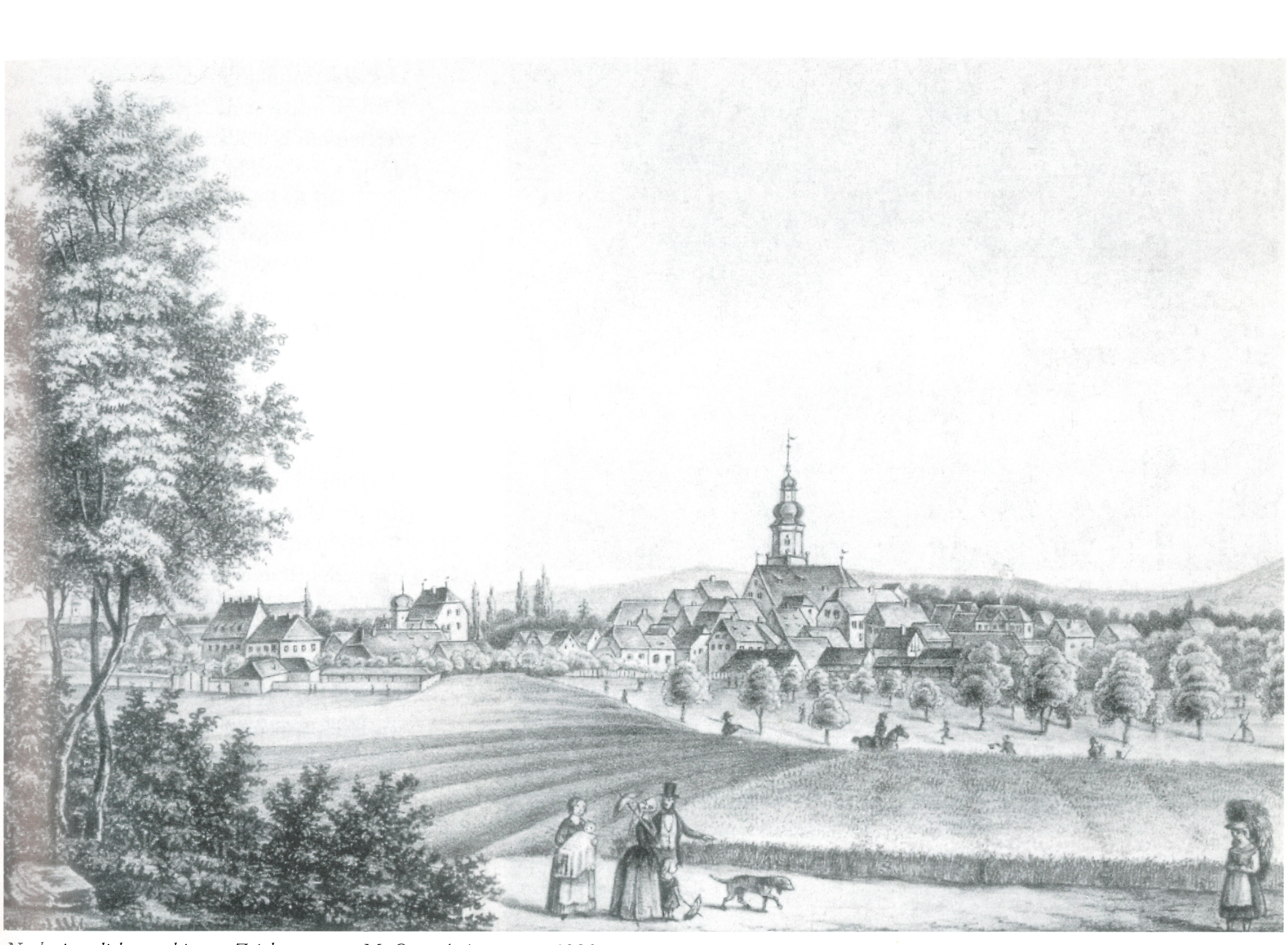 Rüdenhausen, 19. Jahrhundert, lithographierte Zeichnung von M. Otto, um 1830. Links: Neues und Altes Schloss, zentral St. Peter und Paul